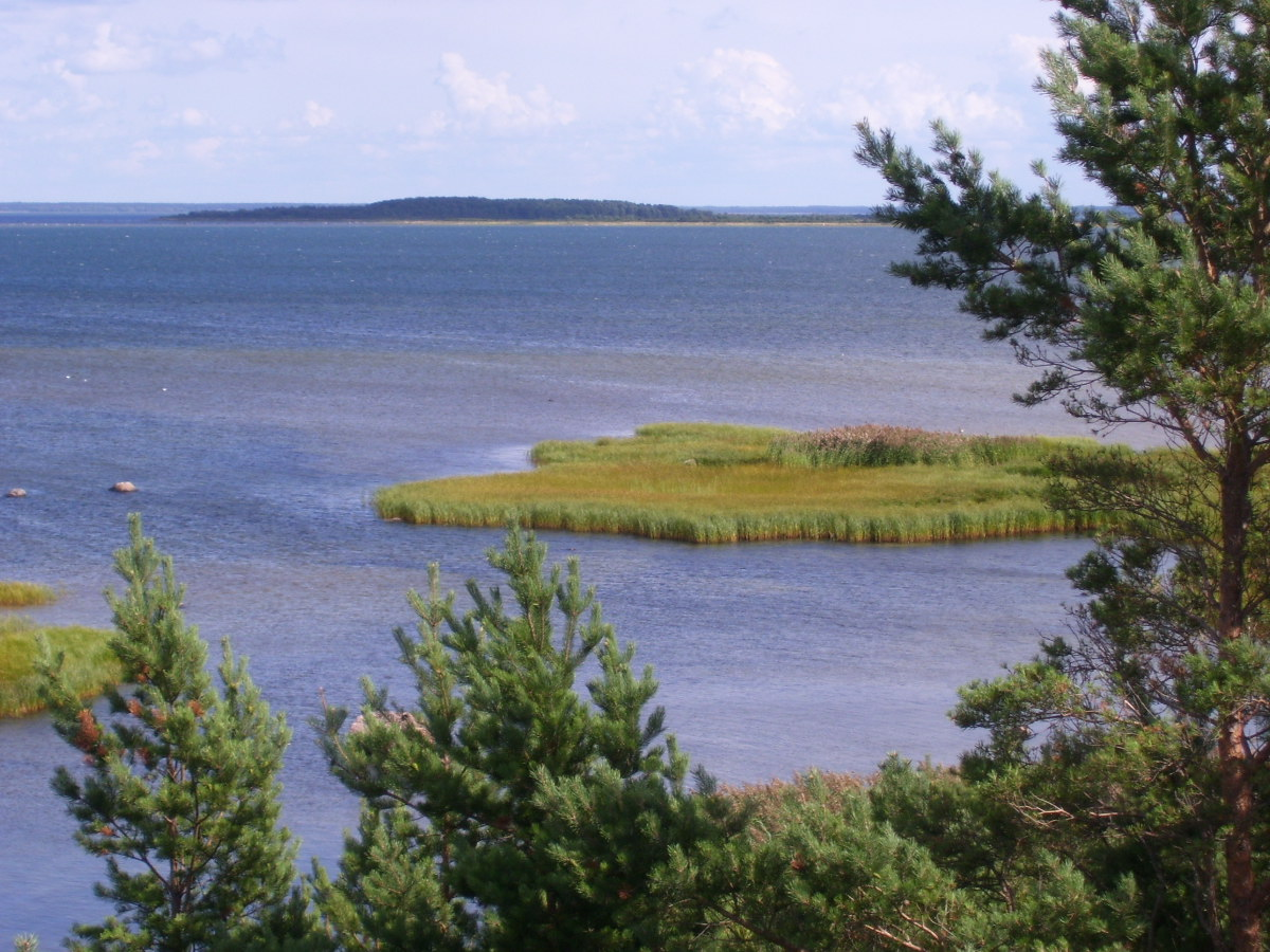 Vaade Kadakalaiule Sääre nina vanalt vahitornilt